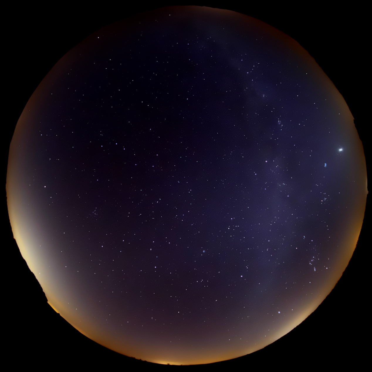 Hemisphärischer abendlicher Frühlingsnachthimmel im Internationalen Sternenpark Westhavelland. Links Osten mit Lichtglocke von Berlin, Arktur im Sternbild Bärenhüter und das Sternbild Haar der Berenike, links oben im Nordosten mit aufgehender Wega, ganz oben Deneb im Sternbild Schwan und darunter der Polarstern (auf halbem Weg zur Bildmitte), rechte Bildhälfte von oben nach unten die Milchstraße mit Sternbild Cassiopeia im Nordwesten, rechts Westen mit Venus, Sternhaufen der Plejaden, das Sternbild Stier und zur Bildmitte hin Capella im Sternbild Fuhrmann, im Südwesten Sternbild Orion, weiter südlich der hellste Stern Sirius im Sternbild Großer Hund, unten Süden. Links von der Bildmitte das Sternbild großer Bär (mit Großem Wagen).